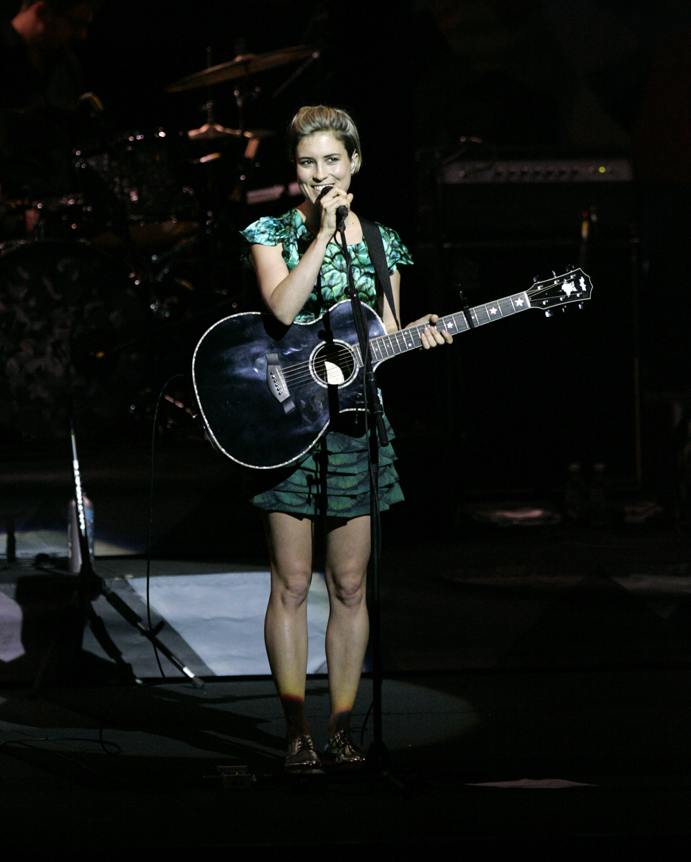 Missy Higgins